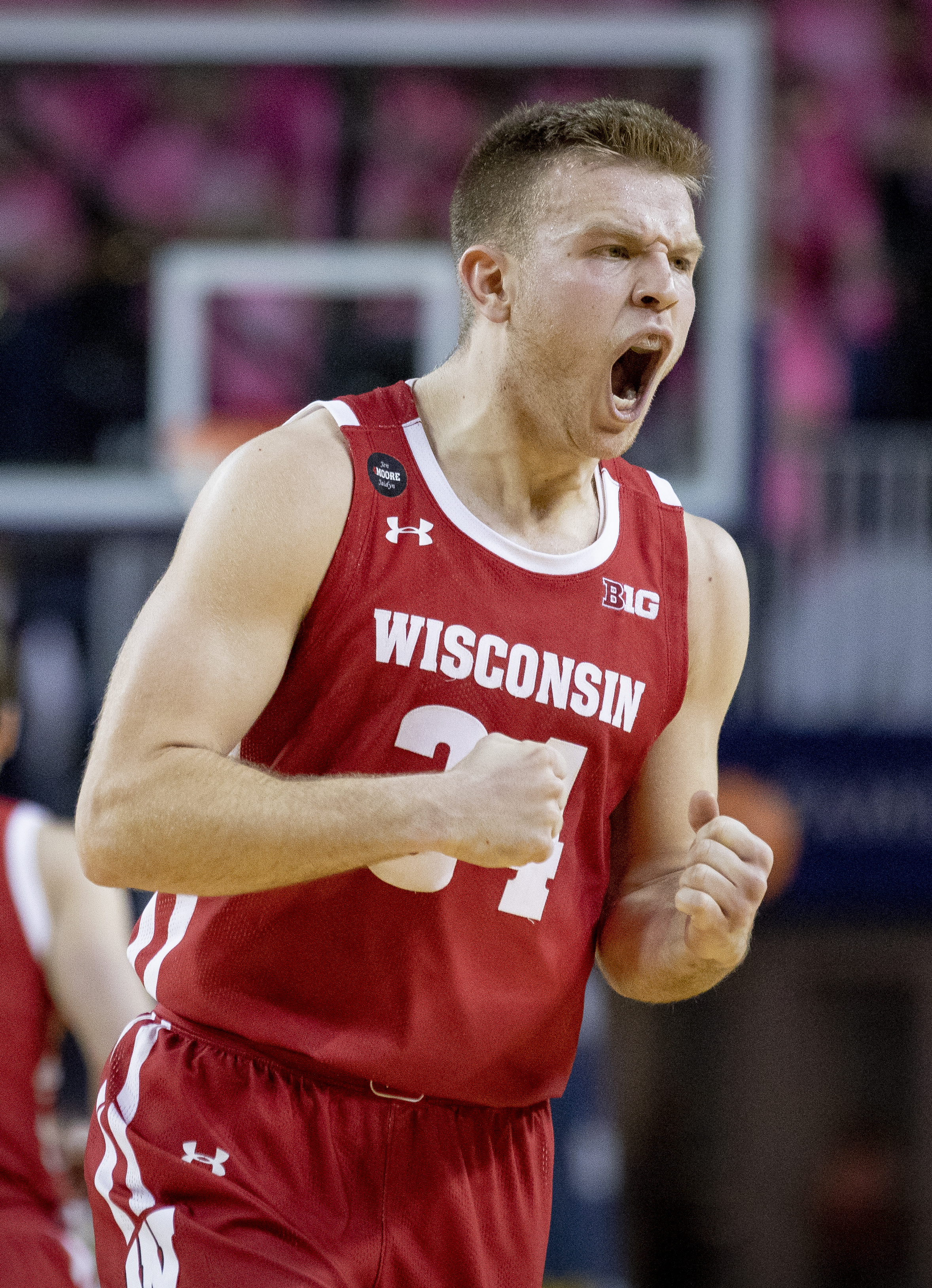 4O6A9673